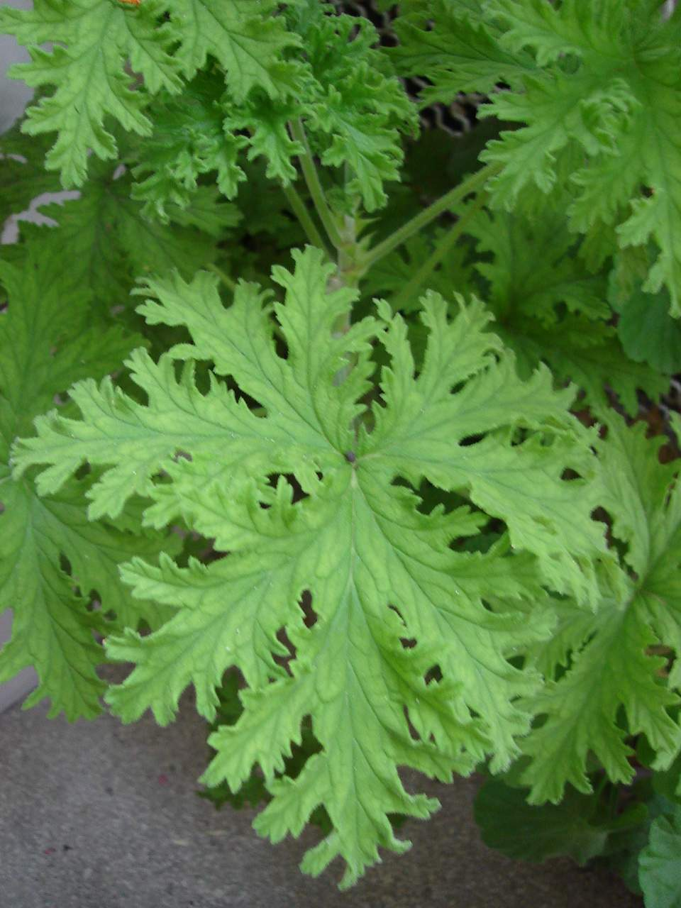 Pelargonium Roseum (Bulg. индрише)